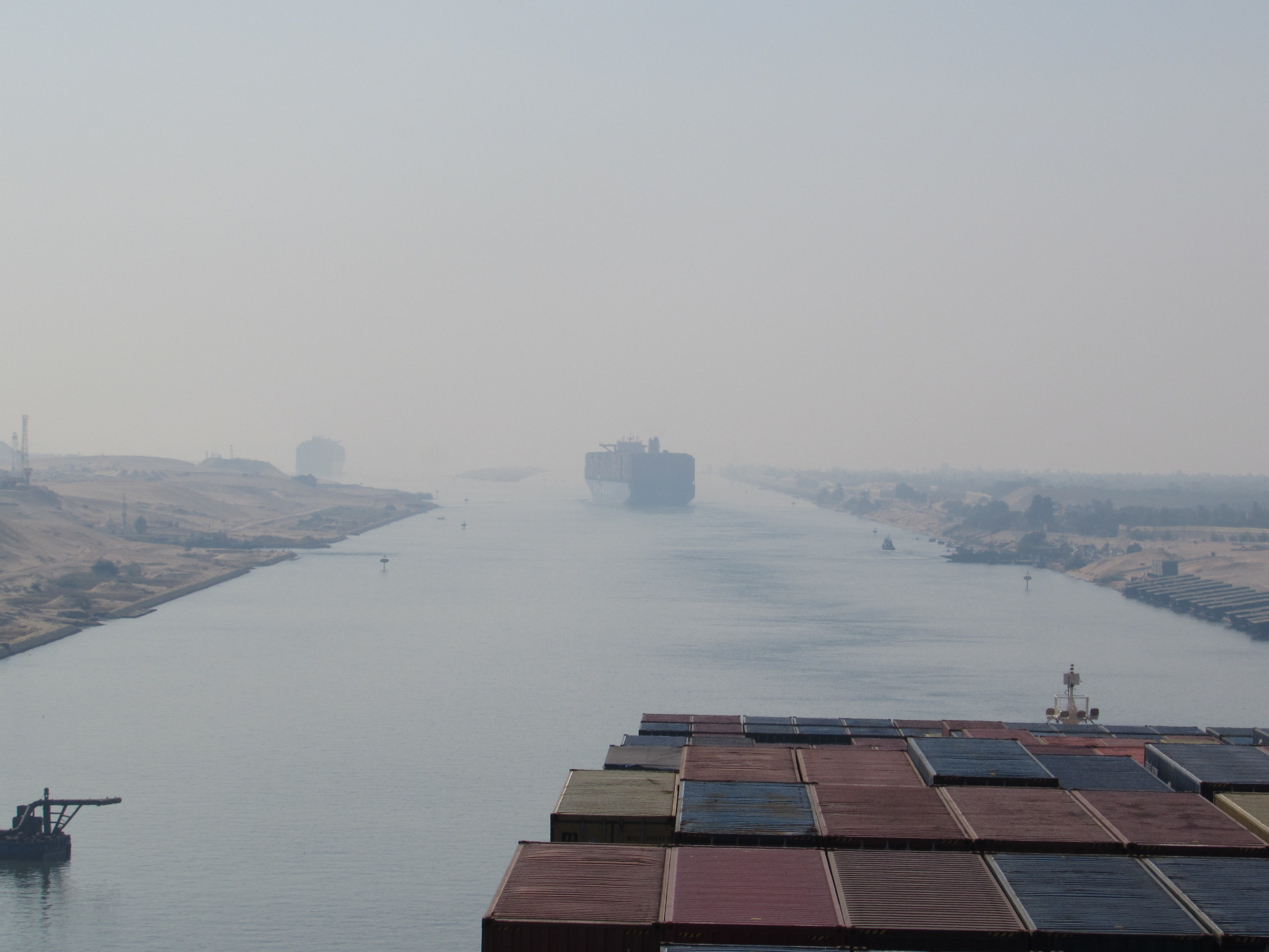 konvoi im suezkanal auf südroute, einfahrt in den by-pass vor dem großen bittersee